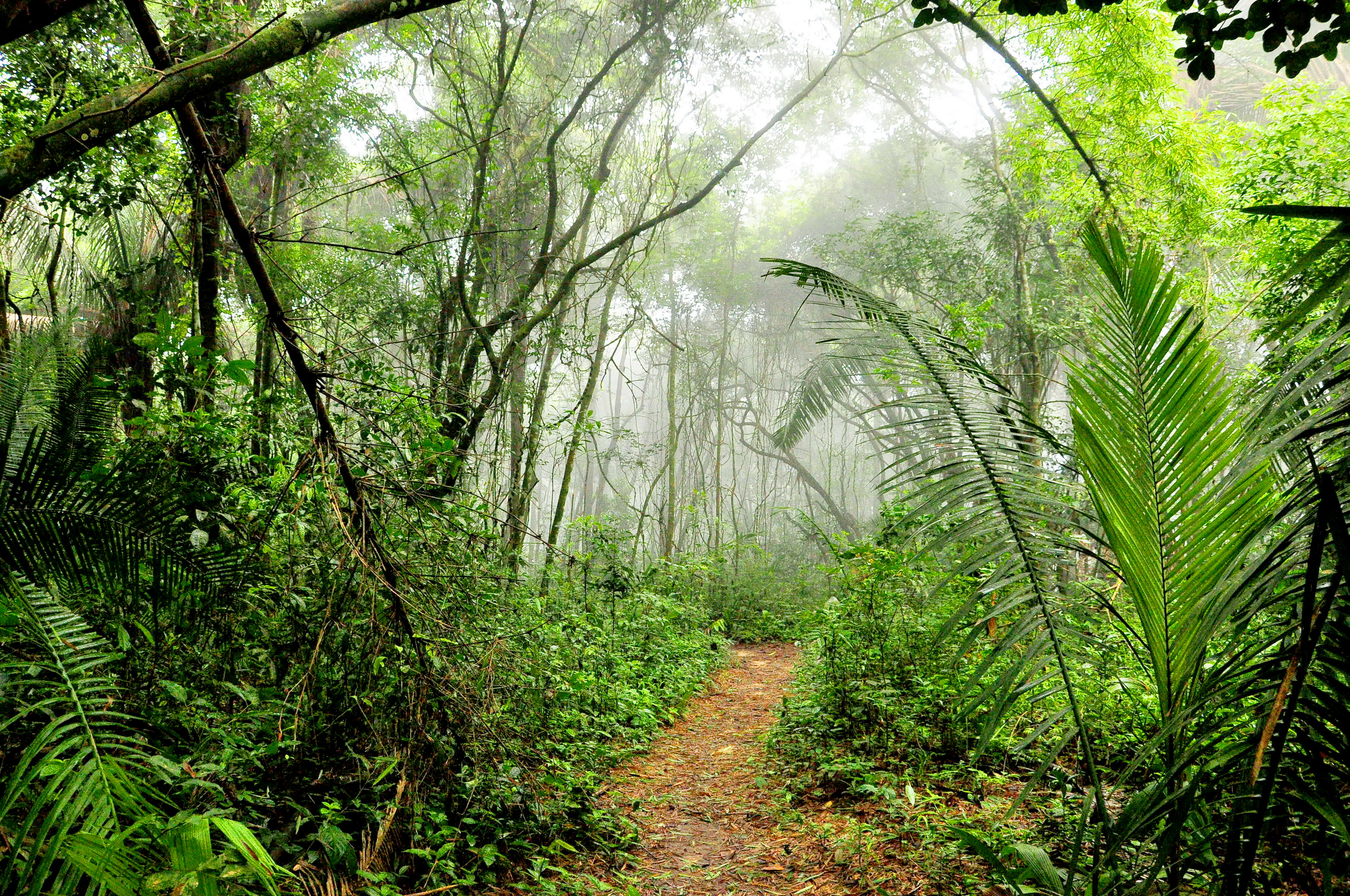 Fotos feitas no âmbito de Ubajara/Ce